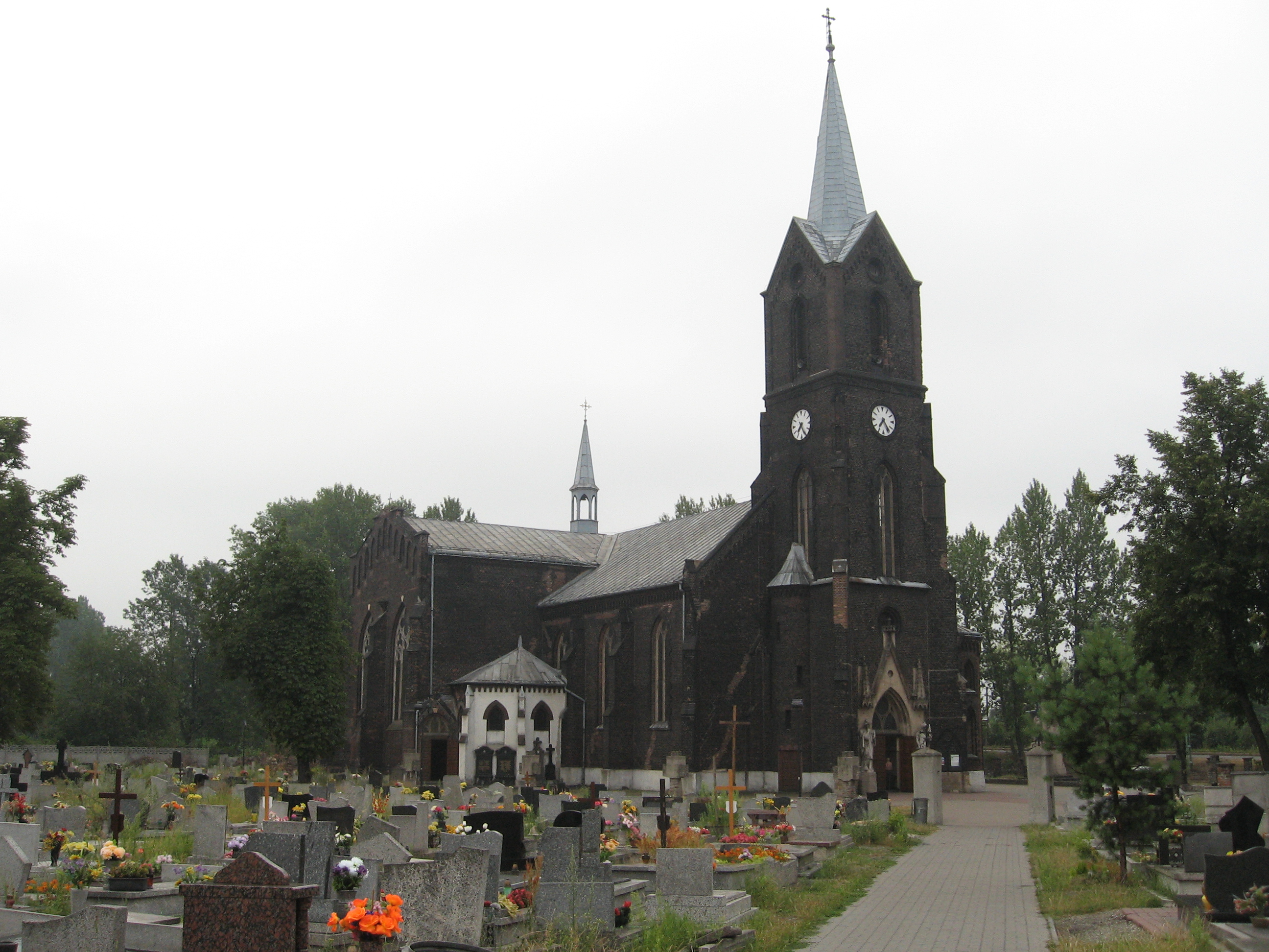 Świętochłowice, Lipiny, kościół św. Augustyna